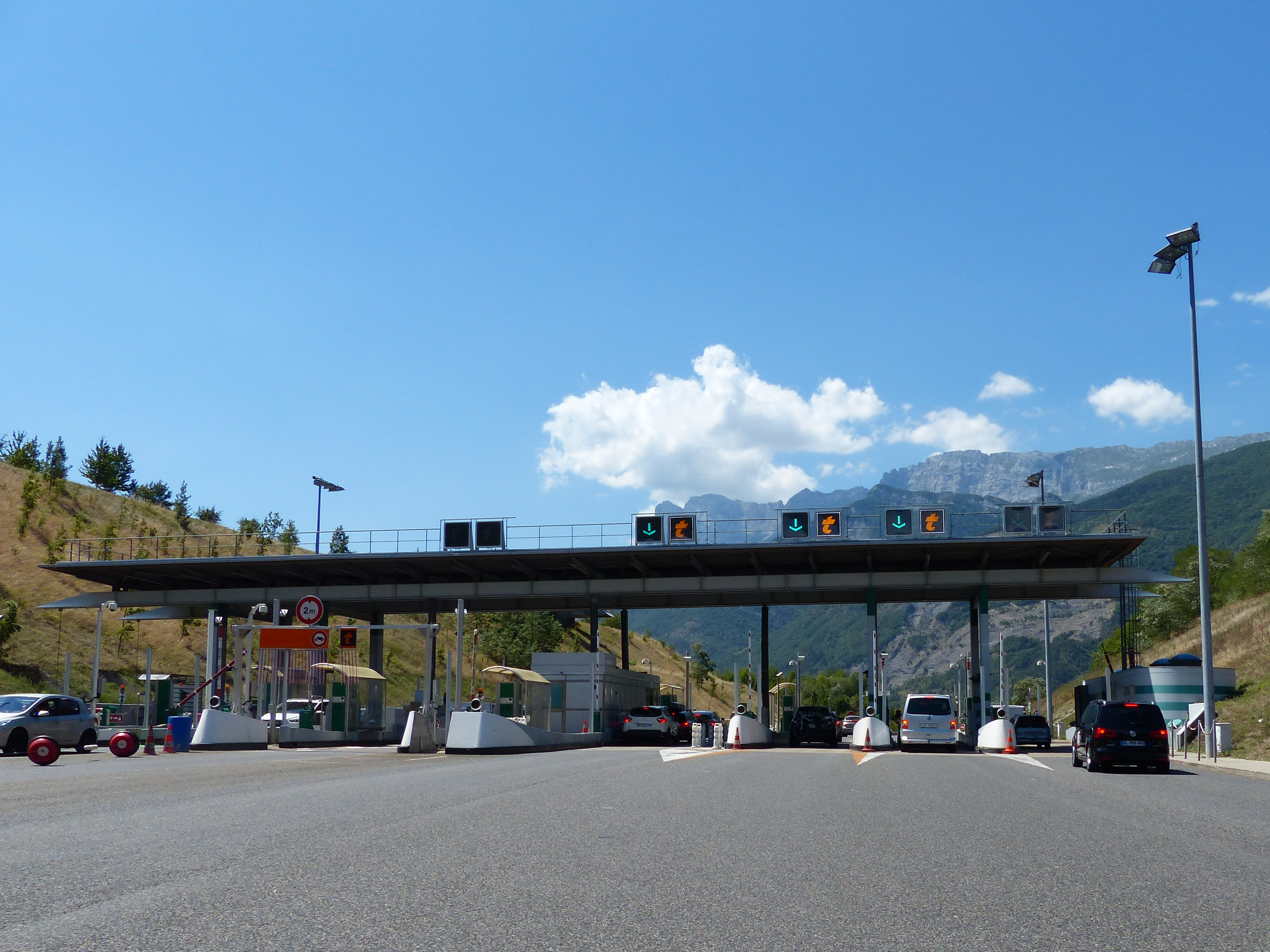 Gare péage du Crozet, autoroute A51, Vif, Isère, France.